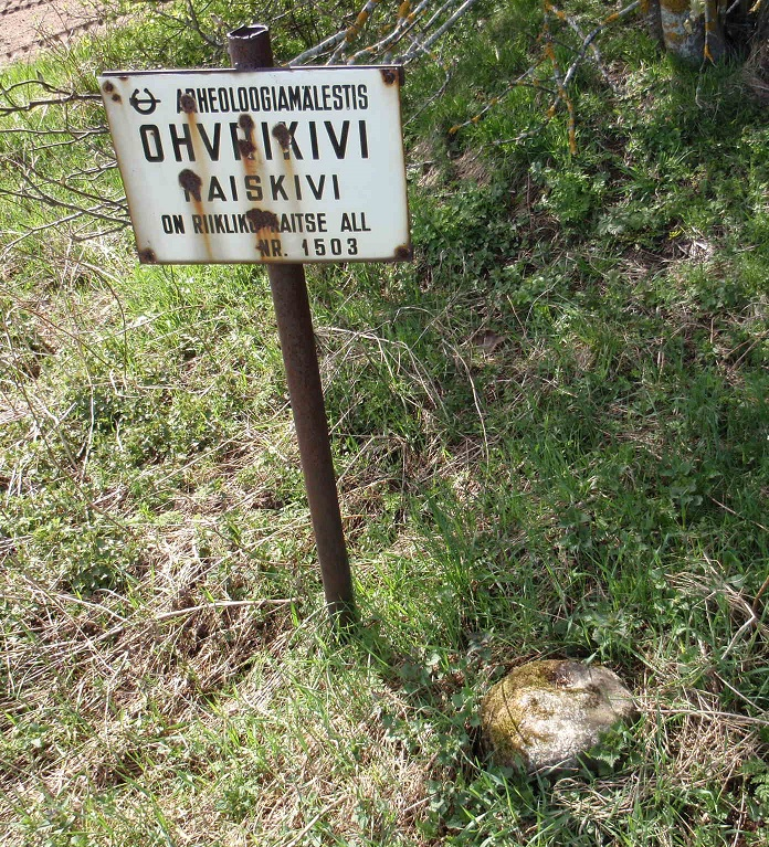 Naiskivi Viru-Nigula vallas endises Mäepealse külas